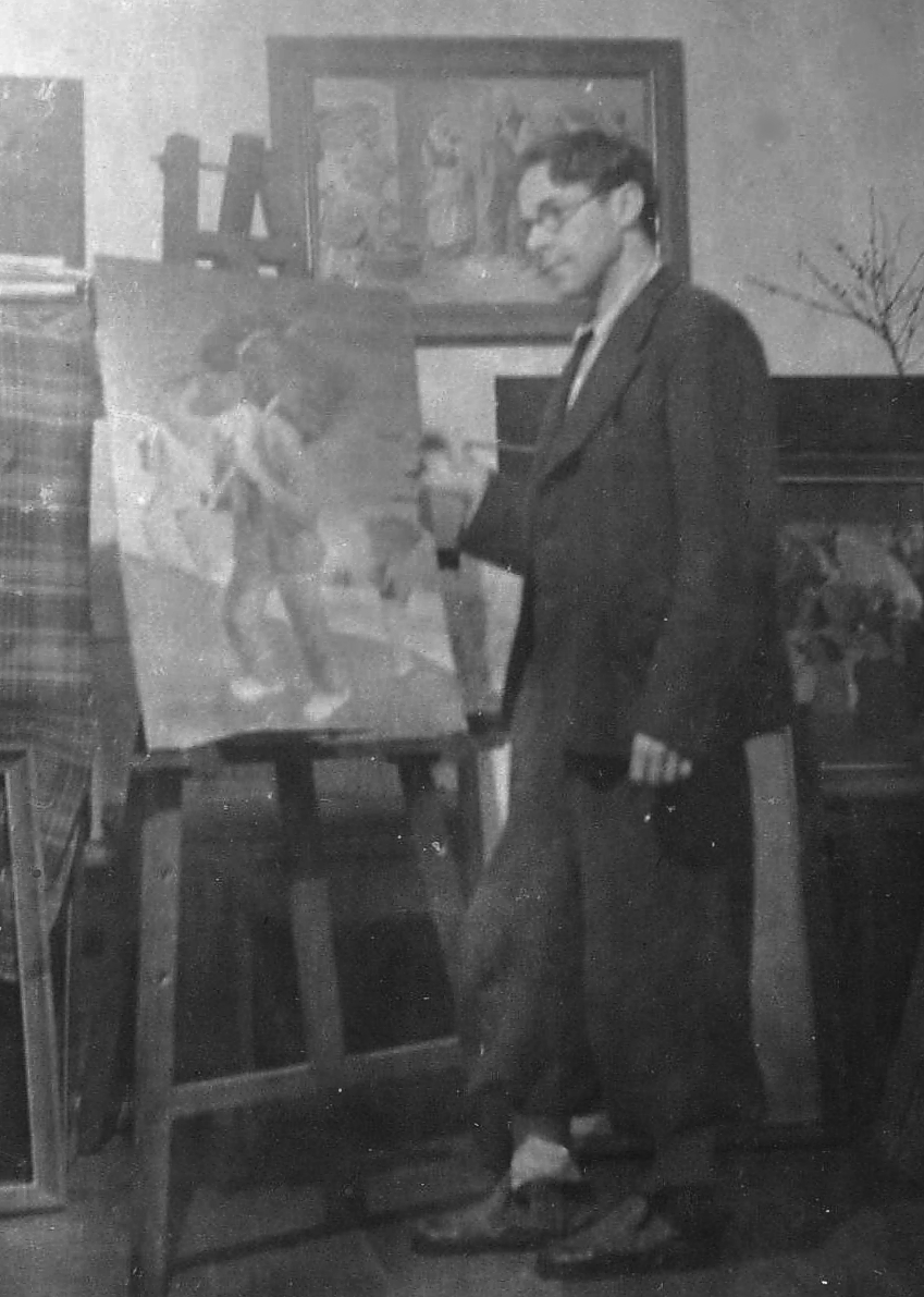 Josef Fruth als junger Künstler